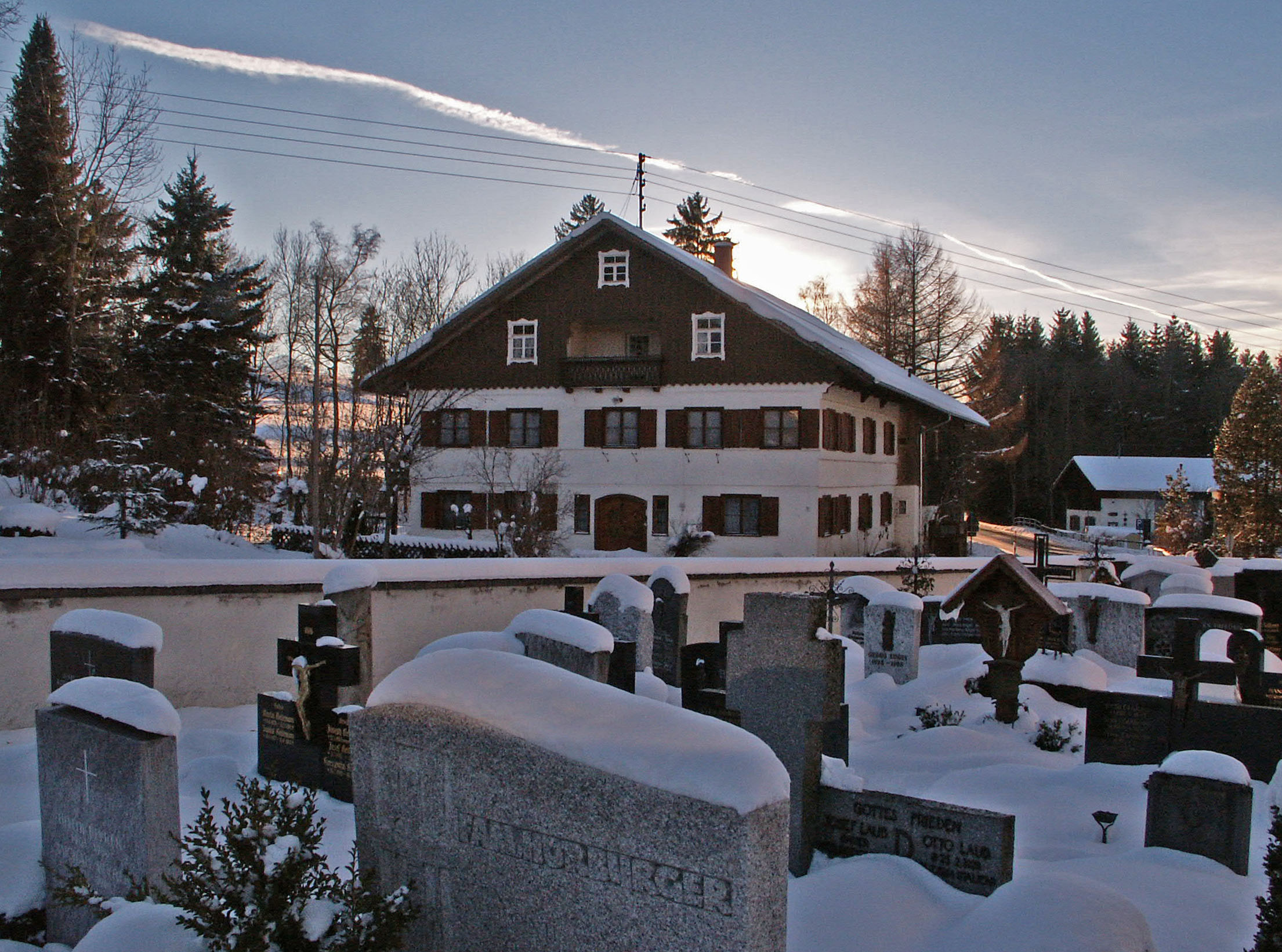 Pfarrhof in Petersthal, Oy-Mittelberg